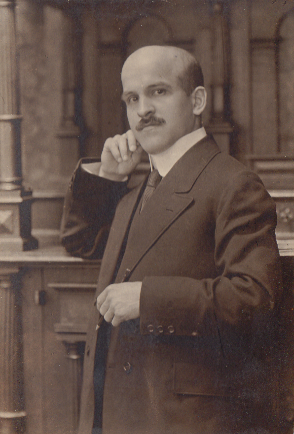 Porträt Friedrich Brinkmann 1921